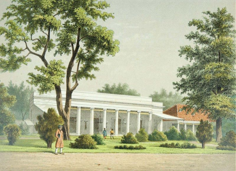 Litho. Litho naar een oorspronkelijke aquarel van Rappard.. De woning van de luitenant-generaal, kommandant van het leger